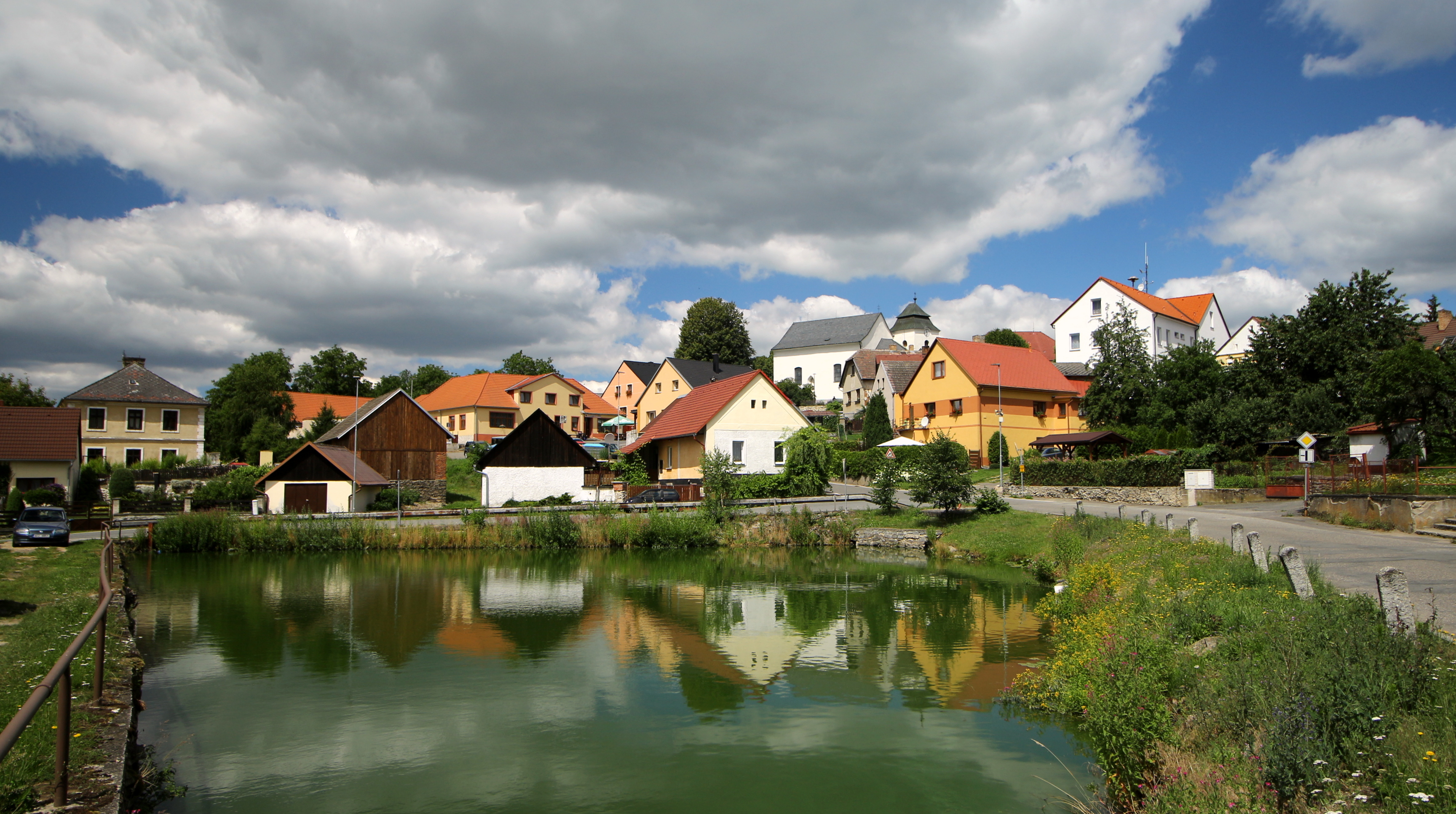 Chyšky